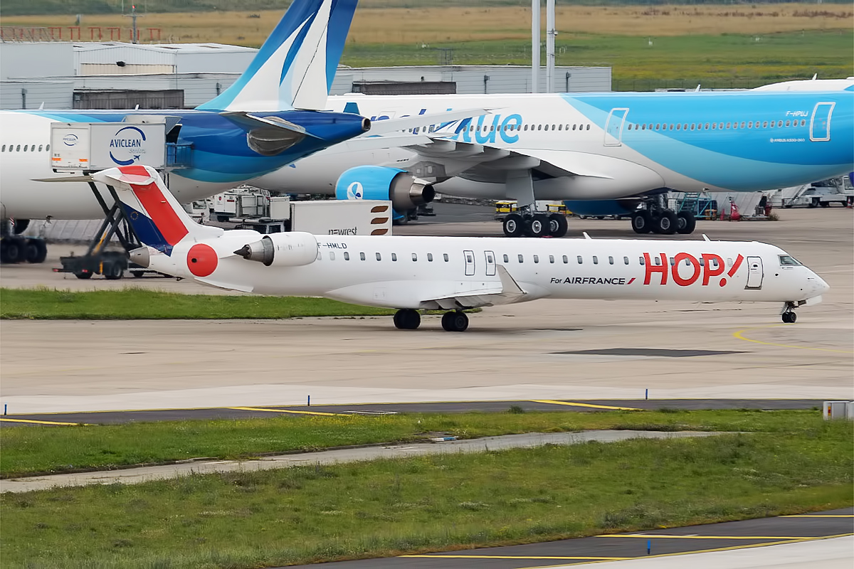 HOP!, F-HMLD, Bombardier CRJ-1000